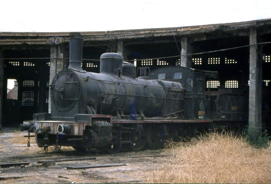 Locomotora 040-2273 (MZA, Serie 547 a 561), en la rotonda del desaparecido Depósito de San Jerónimo (Sevilla). (lat. 37,418454, lon. -5.985939)